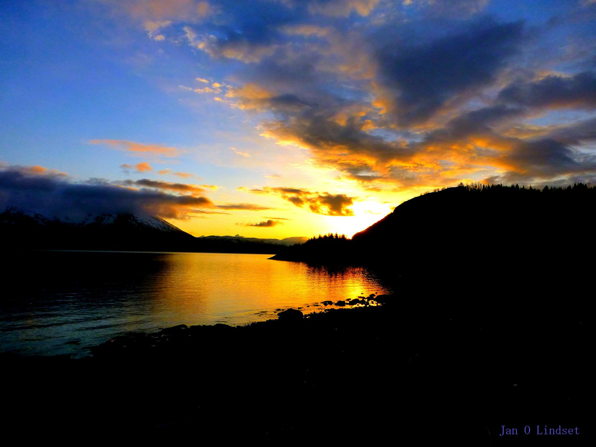 Kveldssol over Vefsnfjorden